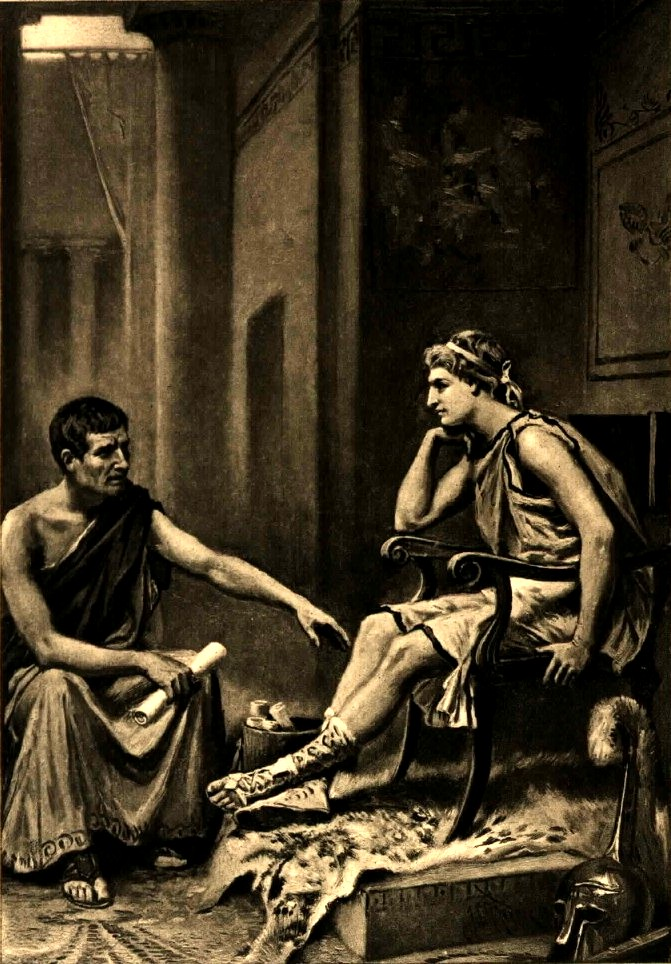 Alexander old drawings